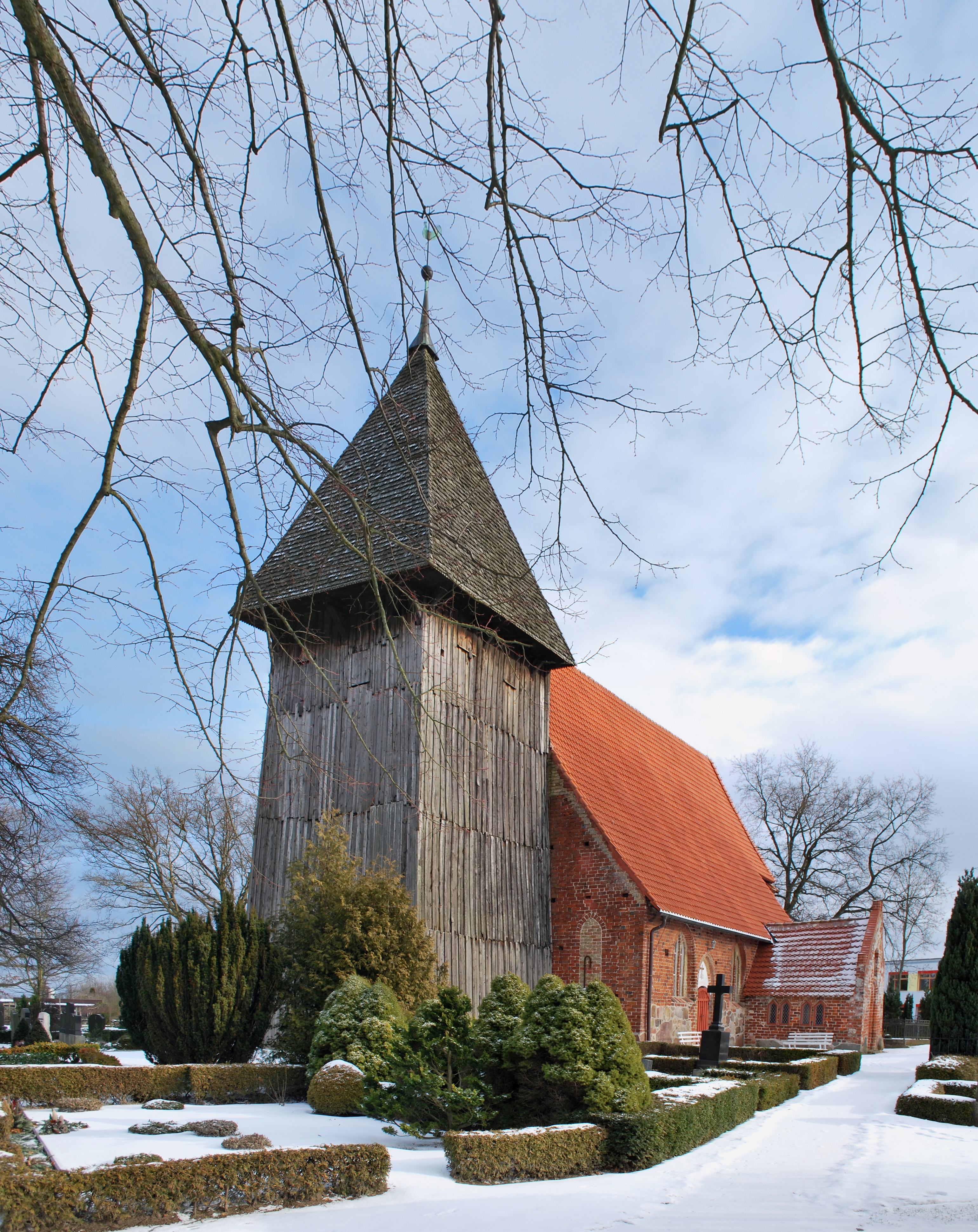 Schulstraße, Kirche, Rethwisch